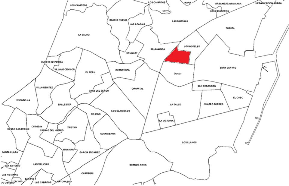 Localización del barrio